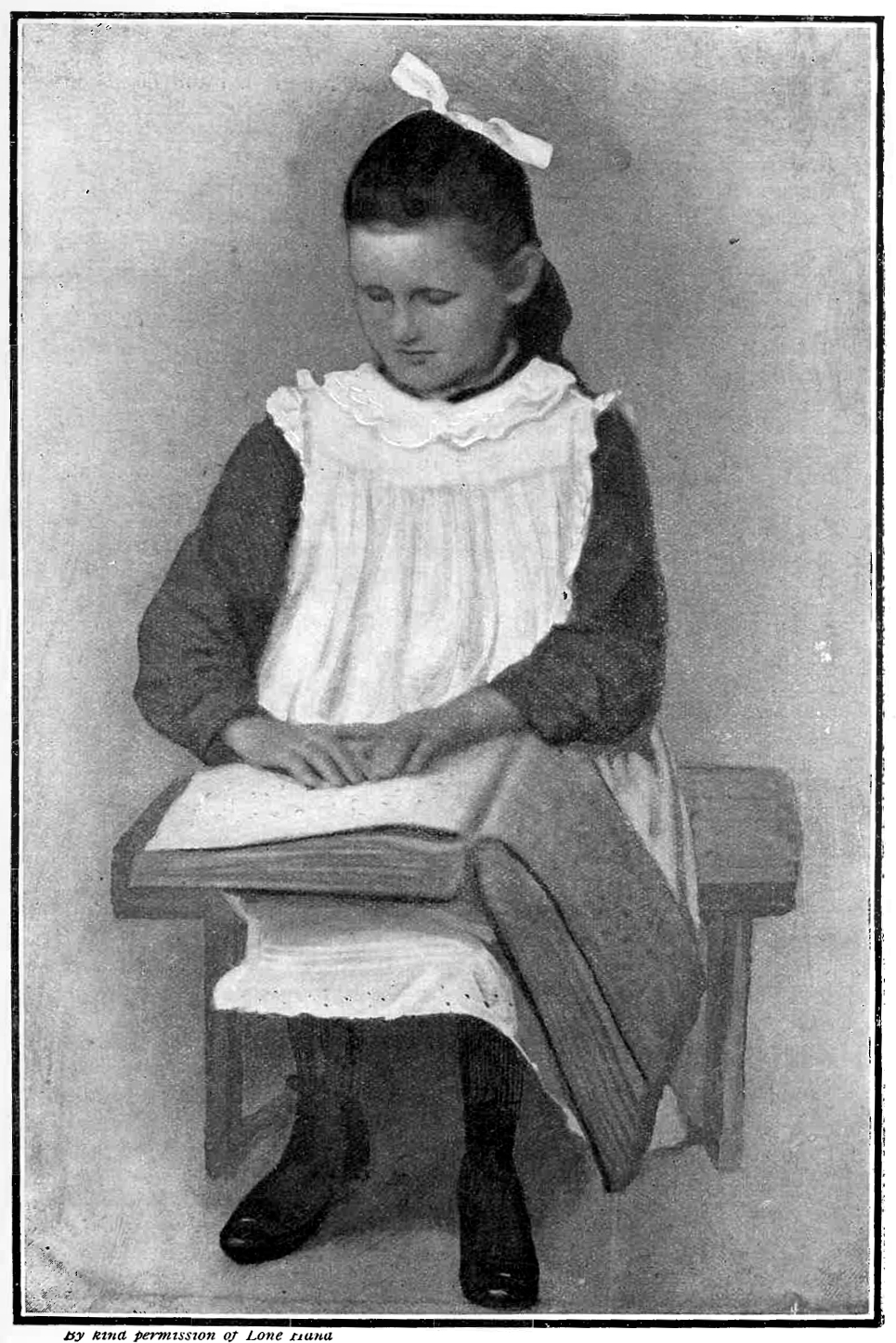 Allice Betteridge - Deaf Dumb and Blind_(The Gesture - The Voice of the Deaf and Dumb of Australasia No. 13, October November December 1911) from Victorian collections